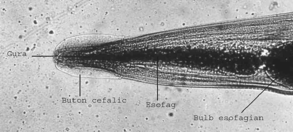 Extremitatea anterioara a oxiurului